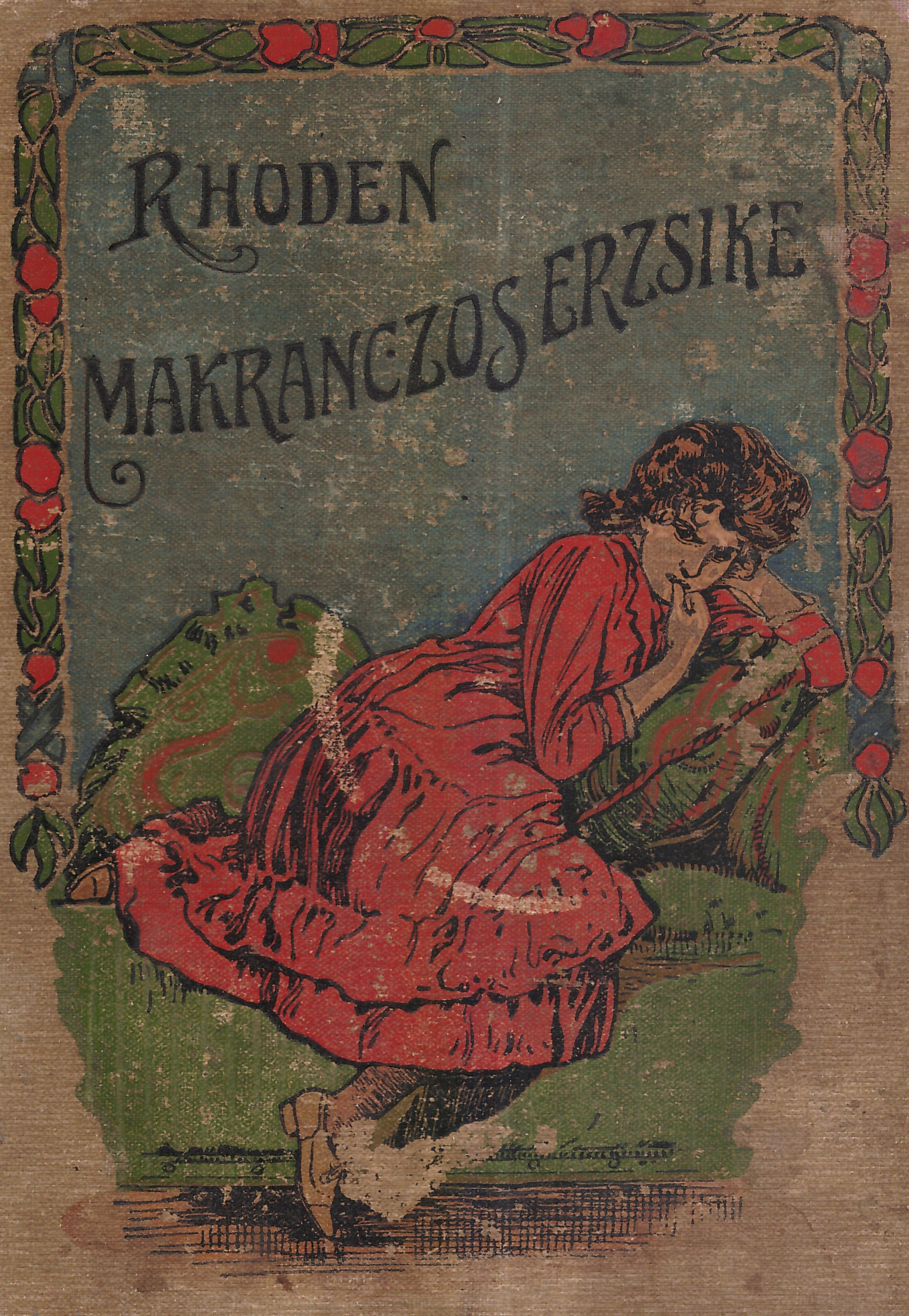 Emmy von Rhoden (1829-1885): Makranczos Erzsike (1900 körüli kiadás)